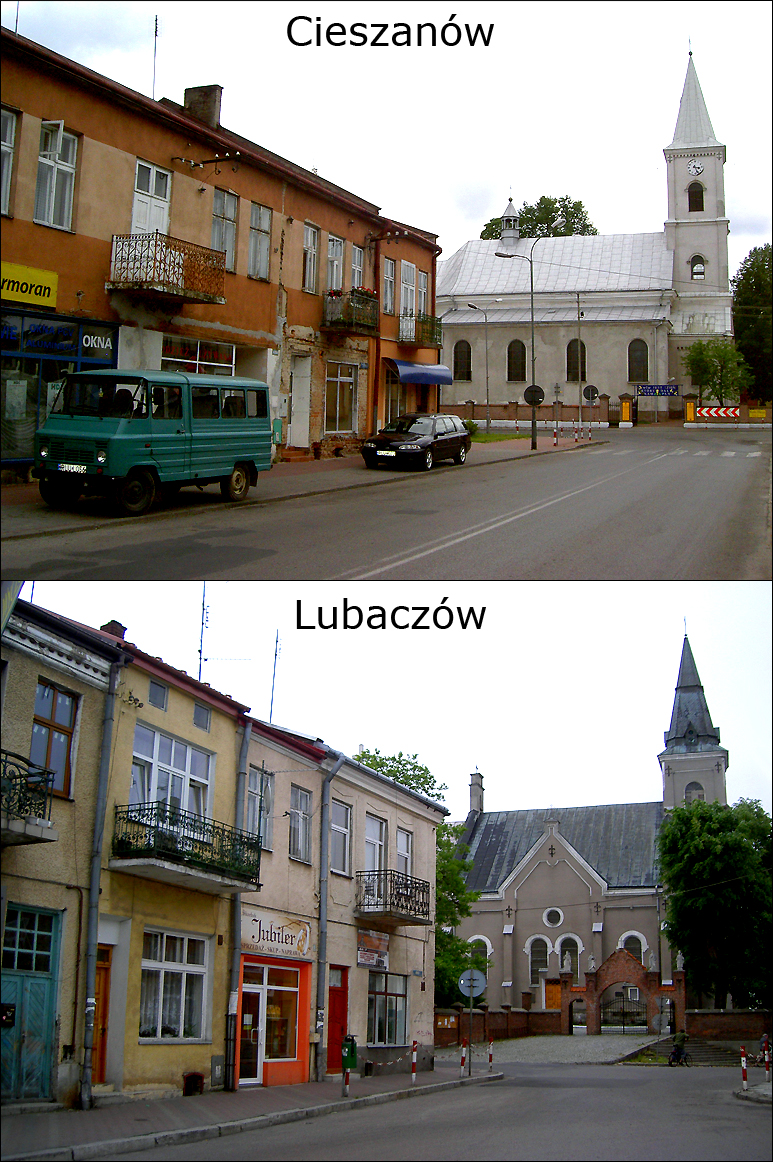 Cieszanów i Lubaczów, Porównanie rynków• Cieszanów and Lubaczów, Poland - Comparison of Main Squares